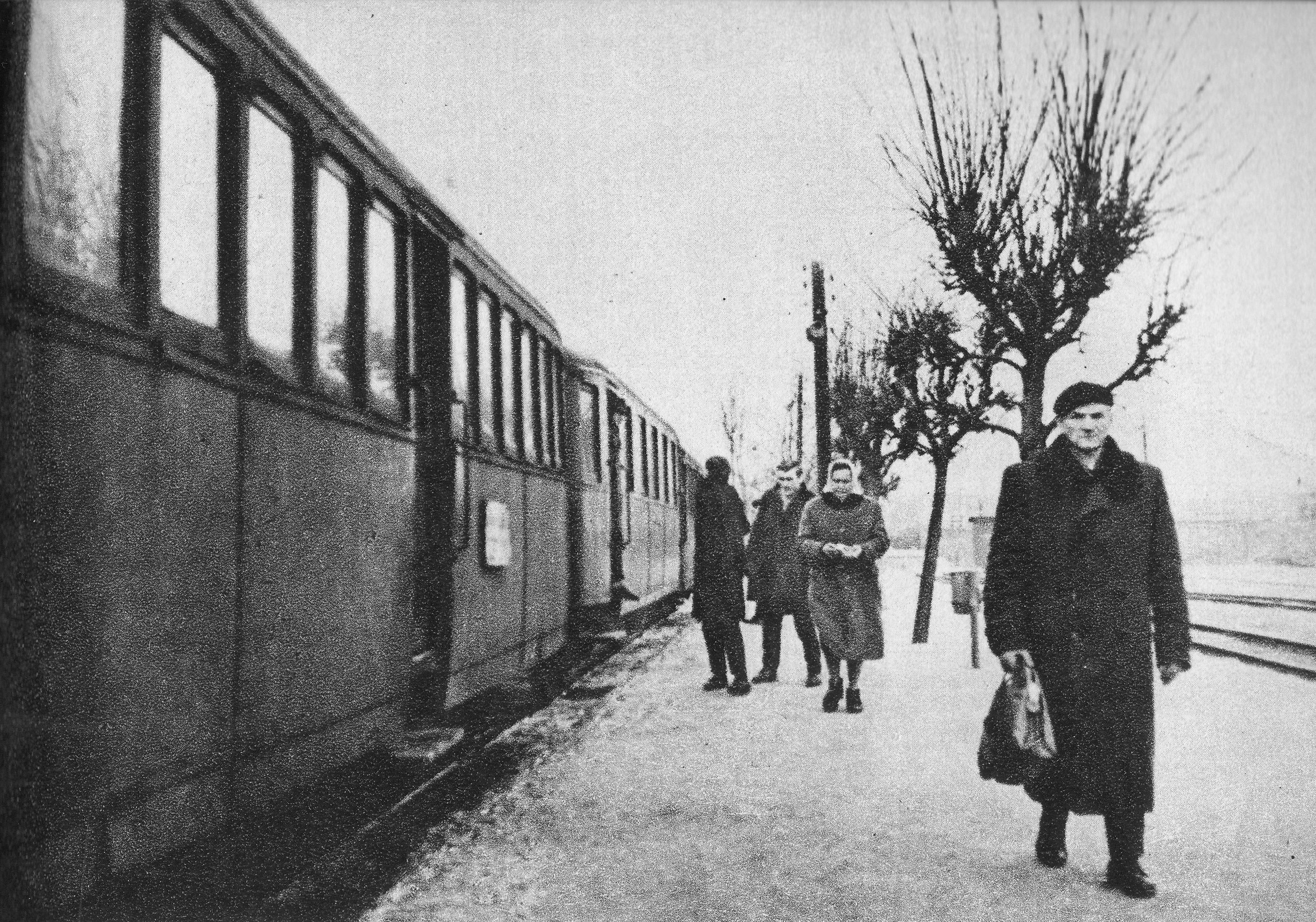 Przystanek kolejki piaseczyńskiej w Pyrach w Warszawie